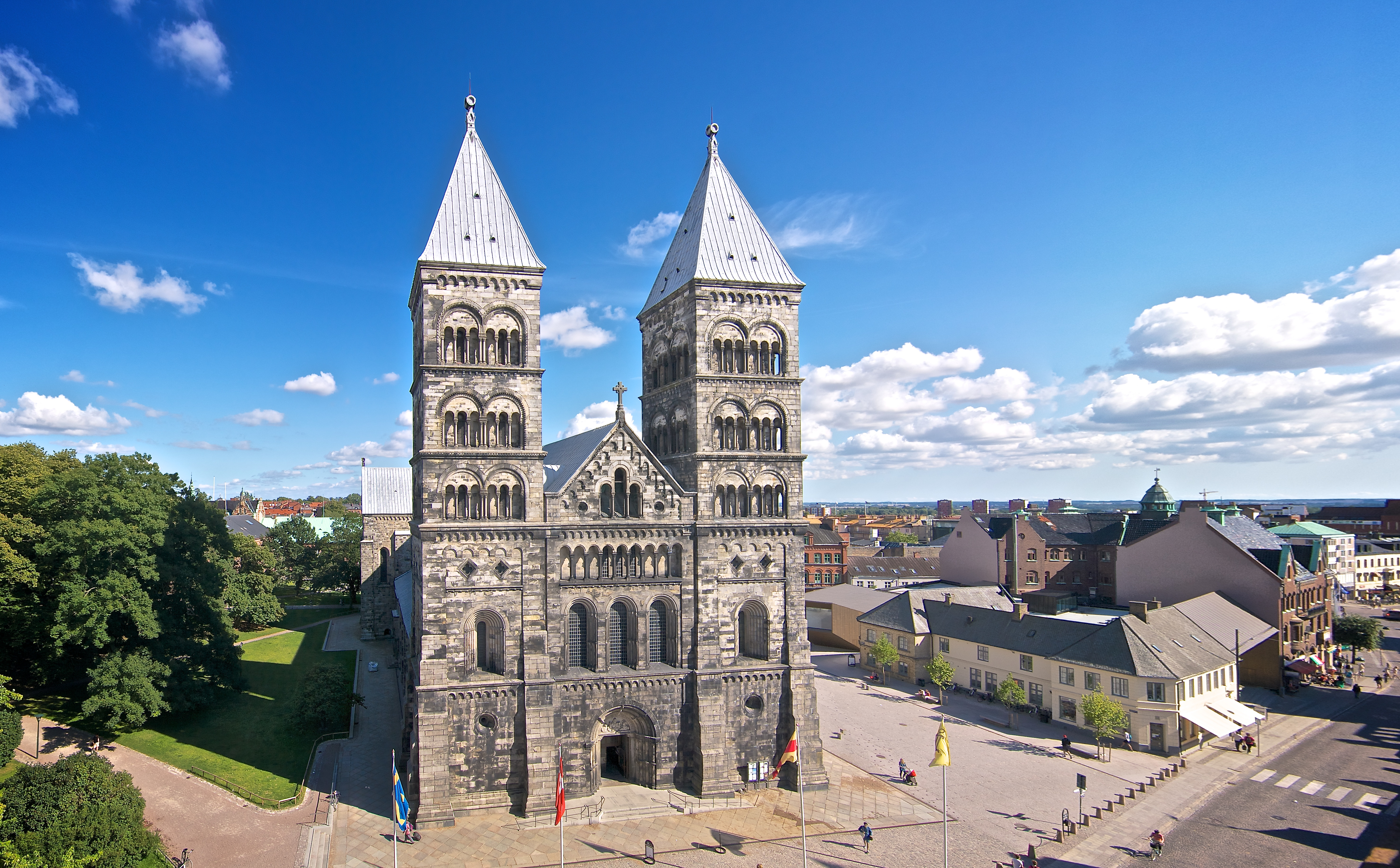 Jag är inte mycket för att göra om gamla bilder, men med mitt nya panorama-program gick det att göra en så pass mycket bättre bild på Domkyrkan att jag inte kunde låta bli. Denna och fler Lundabilder finns även här